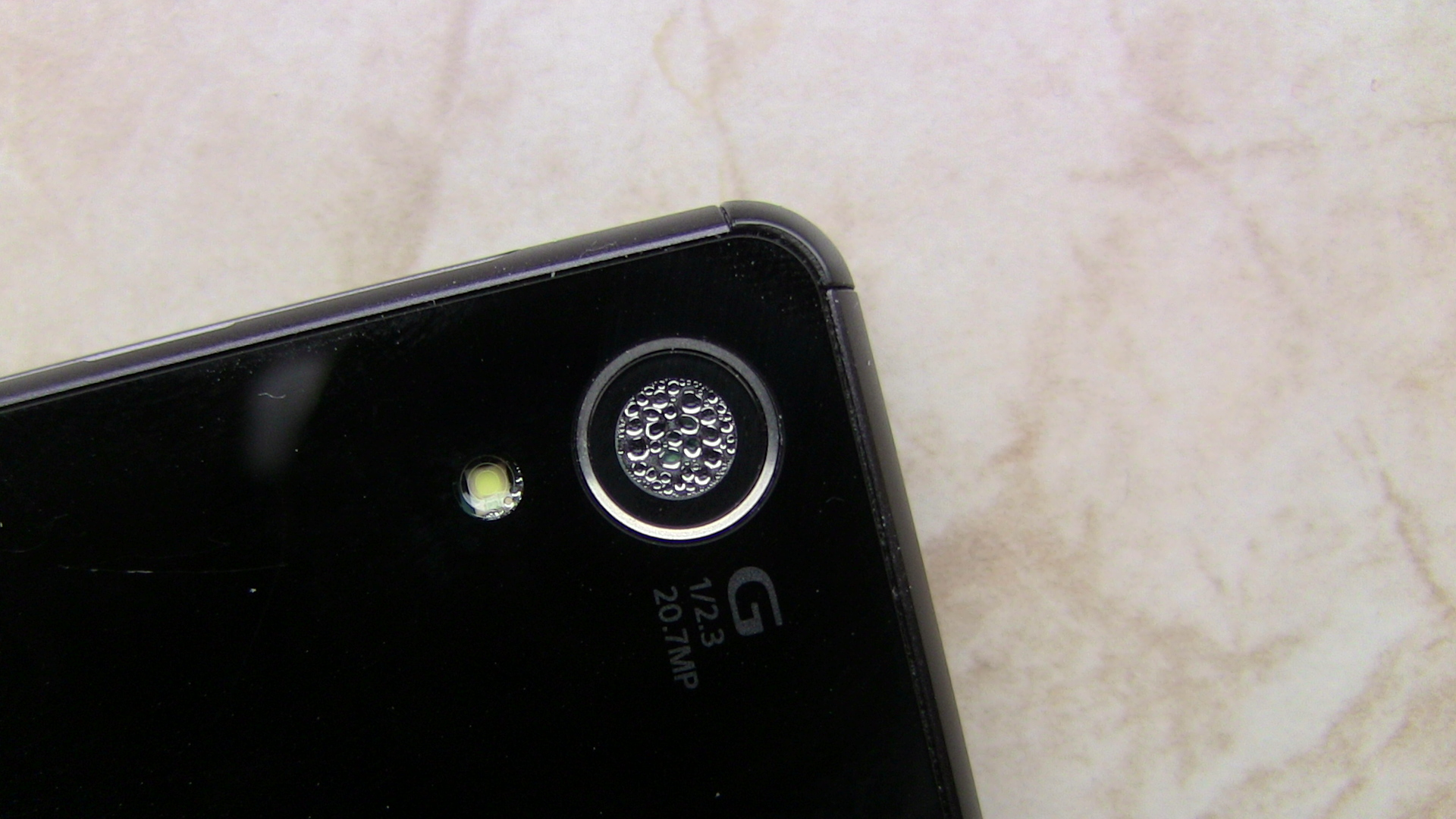 Das Sony Xperia Z3 mit Wasser in der Kamera